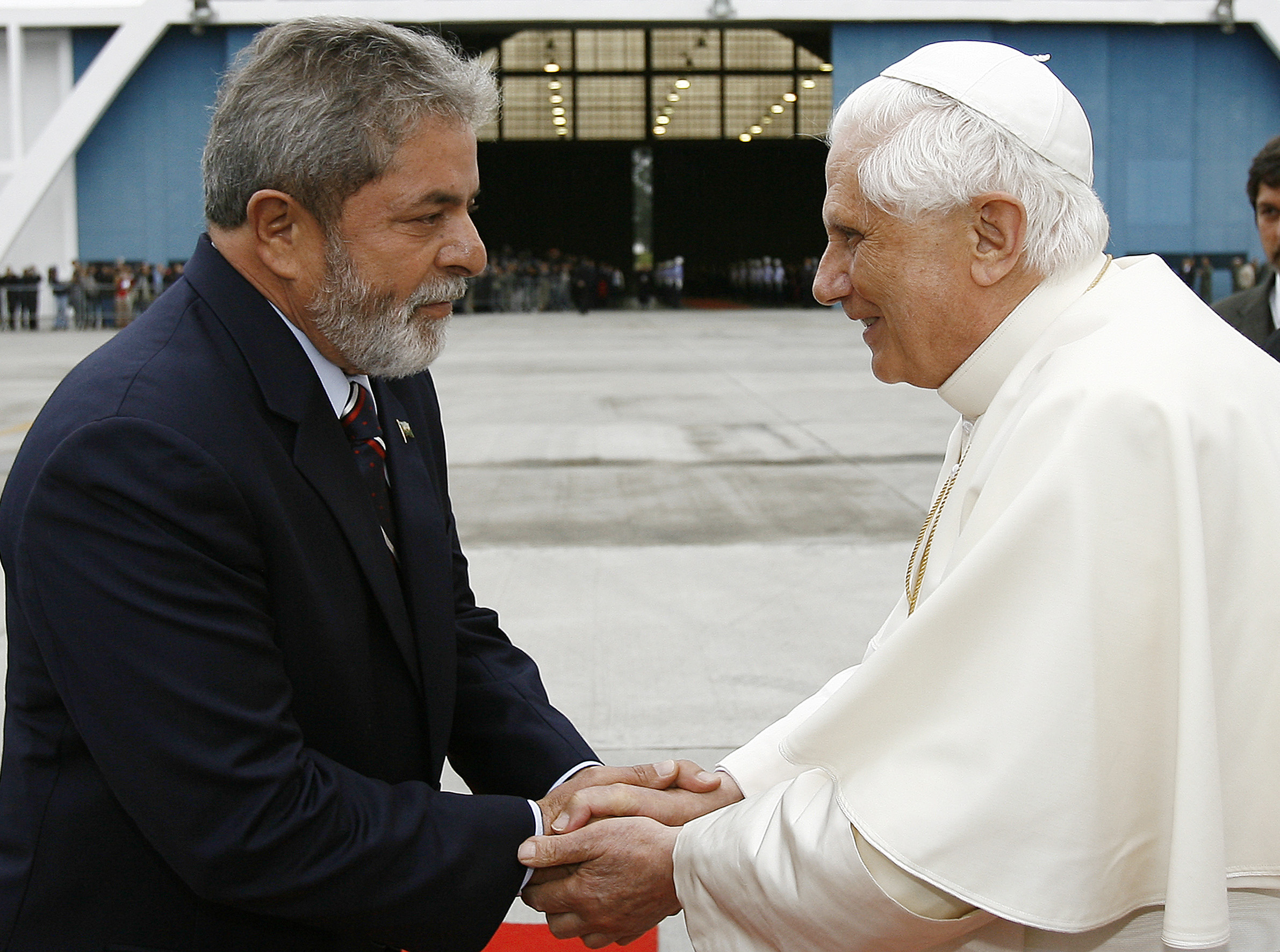 Bento XVI chega a São Paulo e é recebido pelo presidente do Brasil, Luís Inácio Lula da Silva.